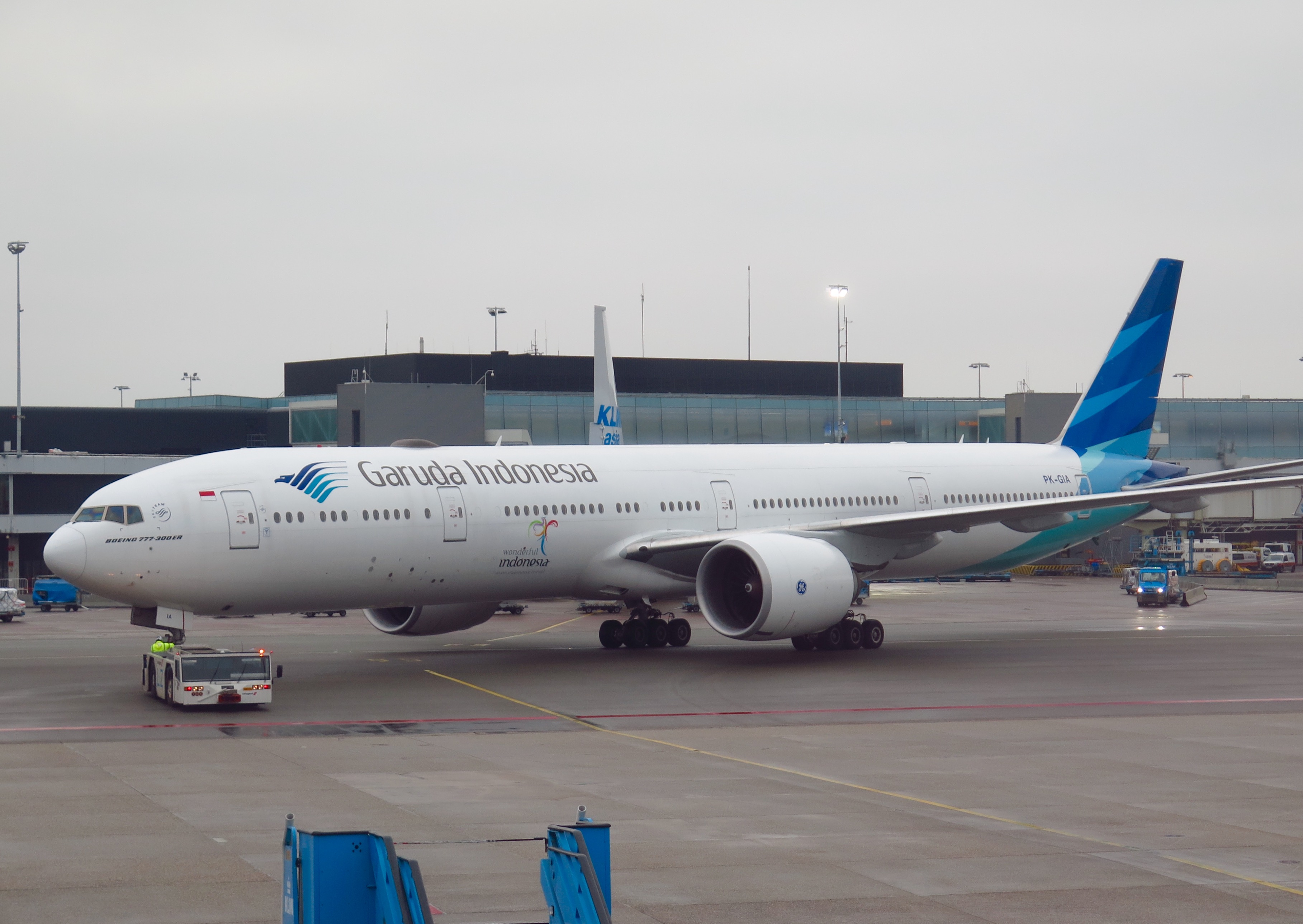 Garuda Indonesia B777 | PK-GIA | Amsterdam Schipol 26/2/17